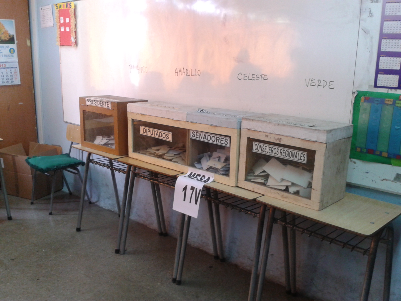 Urnas de votación en las elecciones presidencial, parlamentarias y regionales de 2013.